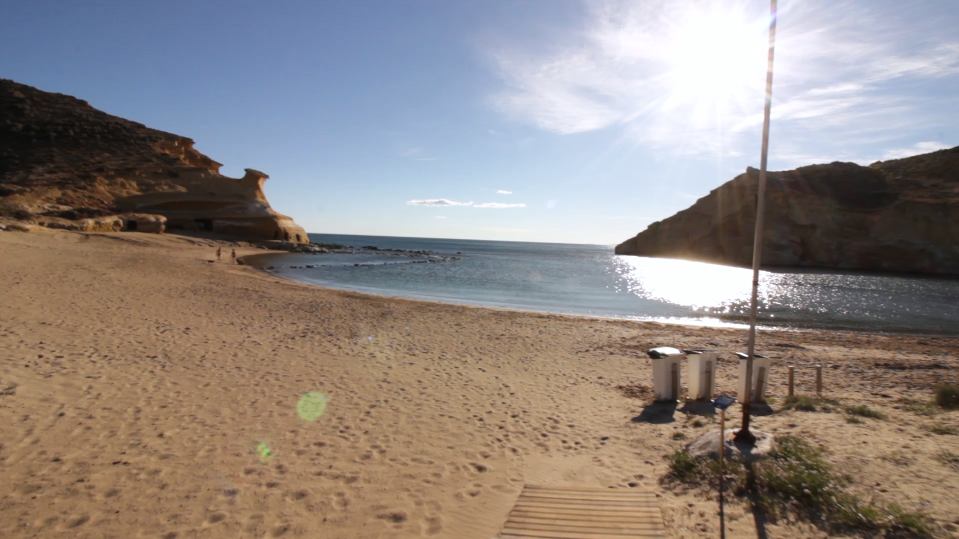 Pequeña playa de la localidad de Pulpi (Almería)